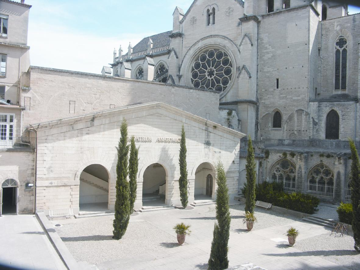 La Cour d'Honneur de la Faculté de Médecine de Montpellier Photographie personnelle